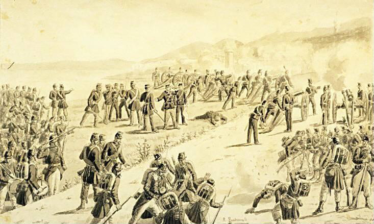 Manfredo Fanti a Mola di Gaeta, ridotto, ritoccato, acquapenna su carta